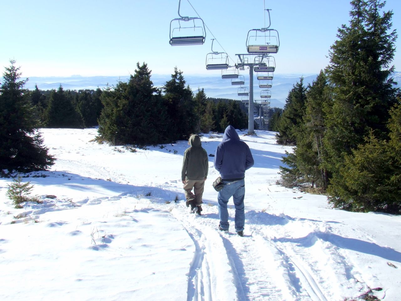 Chairlift Karaman Greben (KGB) on Kopaonik